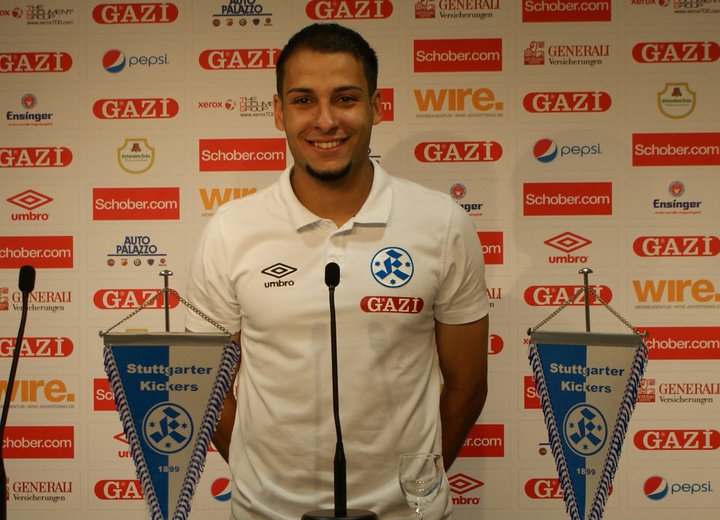 Uğur Yılmaz im Konferenzraum der Stuttgarter Kickers